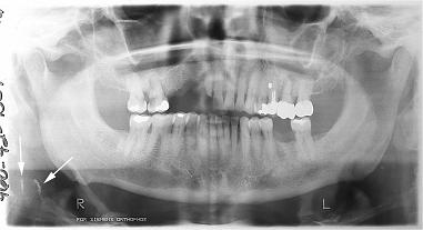 Rentgenový snímek zubů (některé chybějí)